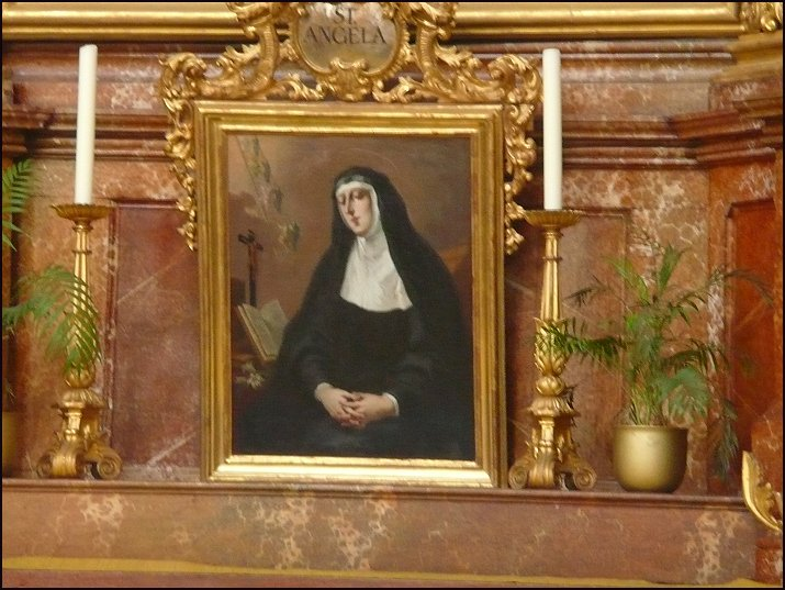 Vorsatzbild auf der Altarplatte des Ursula-Altares in der Ursulinenkirche in Linz von Bartolomeo Altomonte